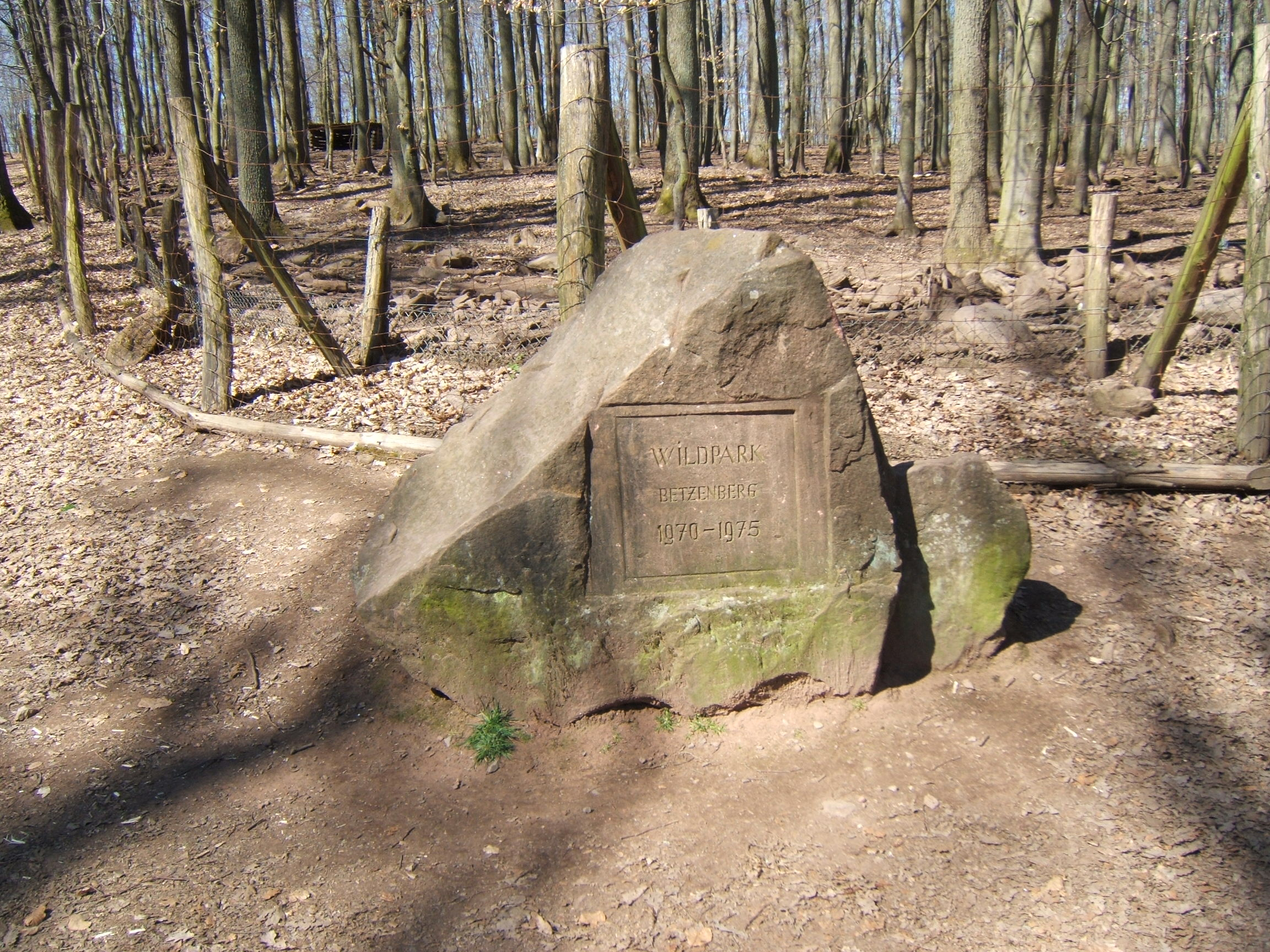 Stein mit Inschrift im Wildpark Betzenberg, Kaiserslautern